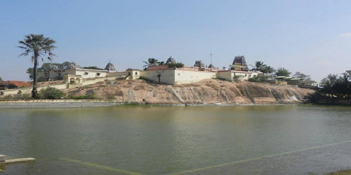 மலையான்டி சுவாமி கோயில்